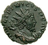 Portret van Tetricus I op een antoninianus (18mm, 2.7 gm) geslagen in Trier in 273/274. Opschrift: IMP C TETRICVS P F AVG.